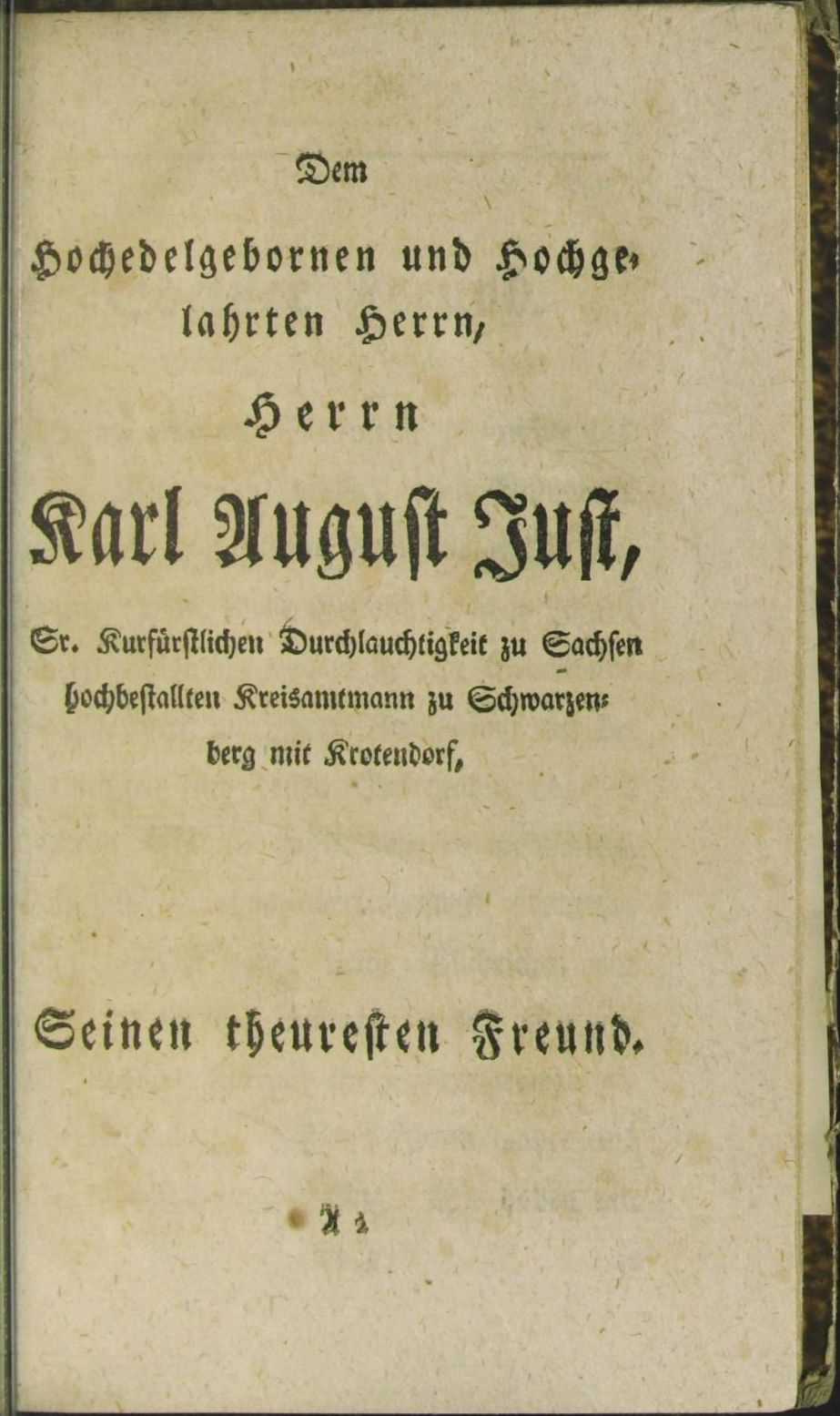 Sosa im Erzgebirge: Christian Heinrich Hecht: Geschichte des kursächsischen Bergfleckens Sosa im Meisnischen Obererzgebirge, Hof und Leipzig, 1778. (Digitalisat in der Staats- und Universitätsbibliothek Dresden) Widmungsseite A2 für den Amtmann Carl August Just, um 1777 und 1787 im Kreisamt Schwarzenberg tätig war.